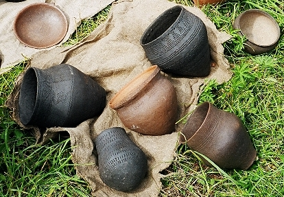 Senieji puodai - rekonstrukcija. Fotografuota Kernavėje, "Gyvosios archeologijos" šventės metu. Autorius: M.Dirgėla